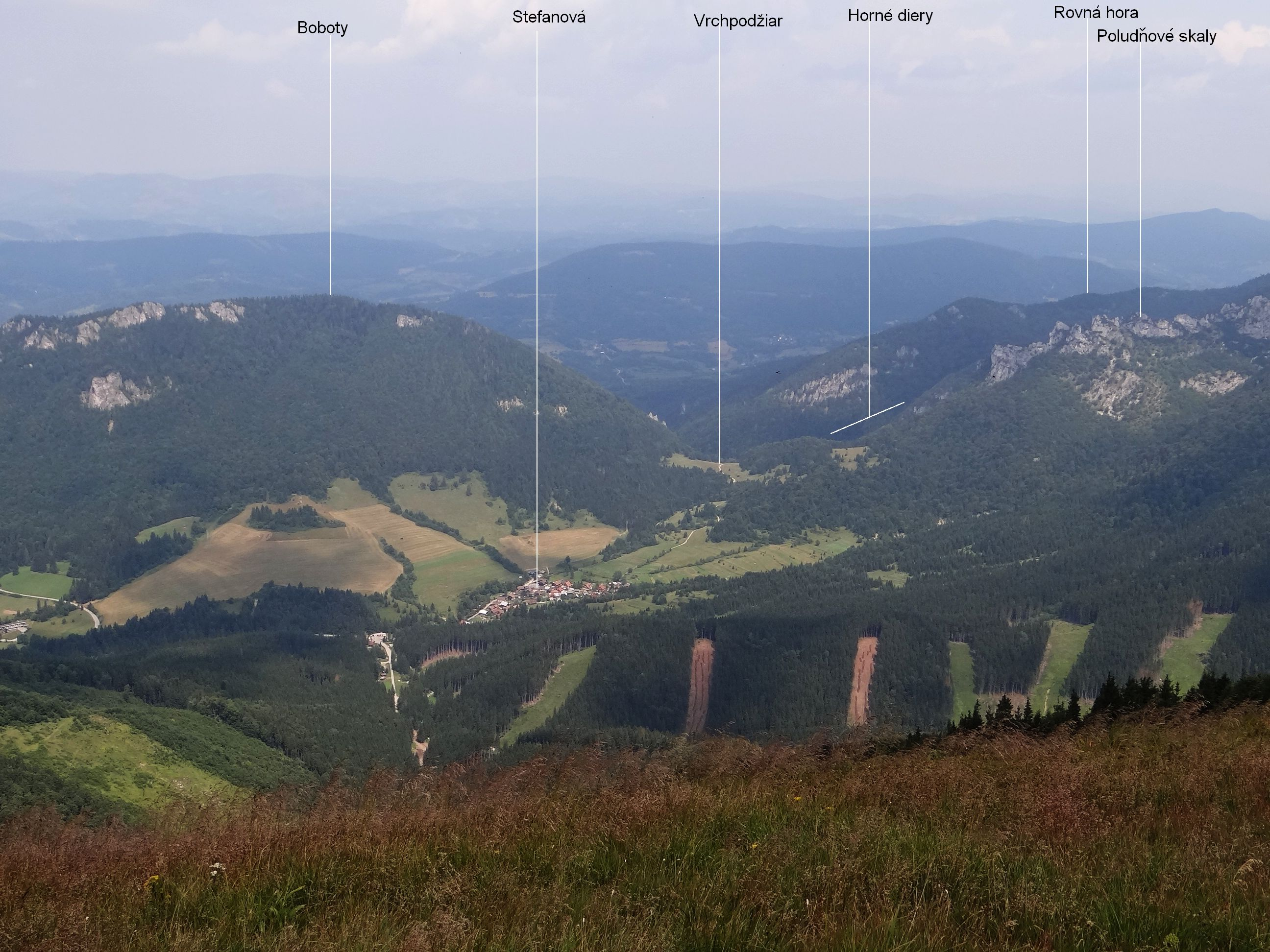 Nová dolina